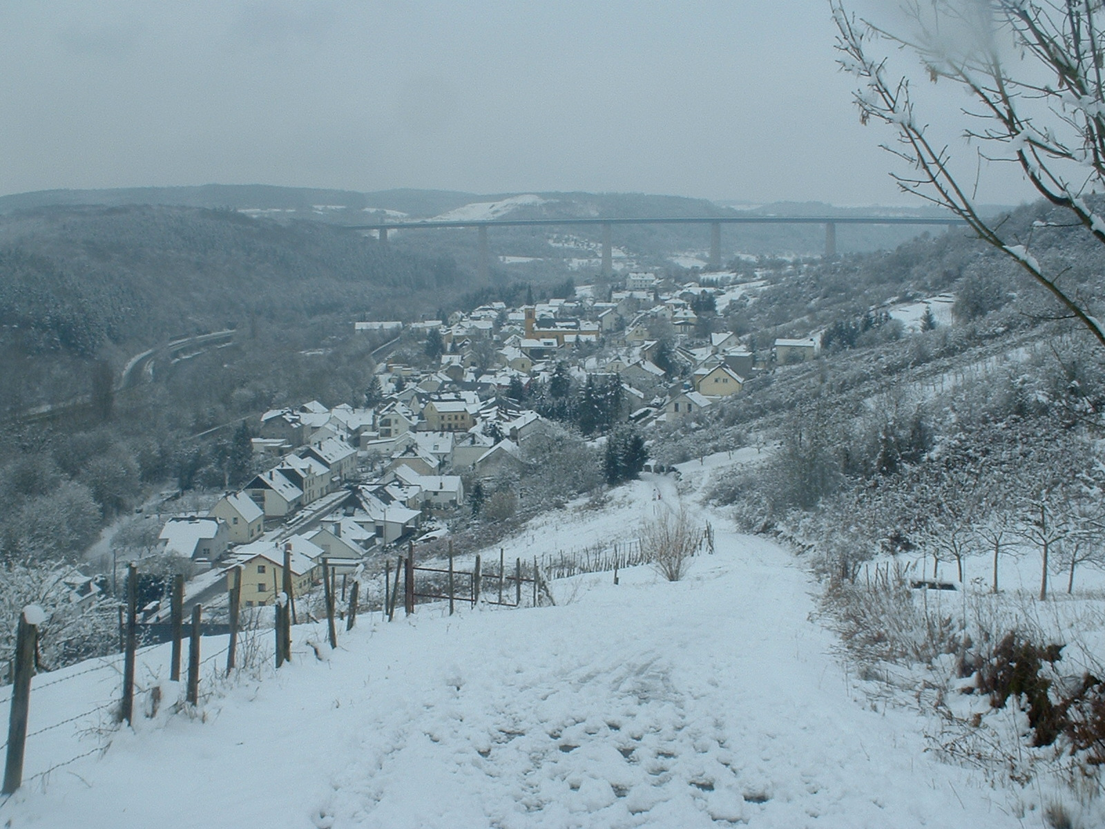 Ein Blick auf das winterliche Mesenich im März 2006